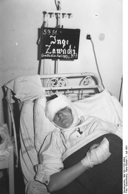 berlin, verletzte Retterin des Treptower Schiffsunglücks ADN-ZB/Illus- Quaschinsky Die heldenhafte Retter beim Treptower Schiffsunglück am 5.7.51. UBz: Die verletzte Pionierleiterin Inge Zawacki liegt mit schweren Brandwunden im Krankenhaus Fiedrichshain.